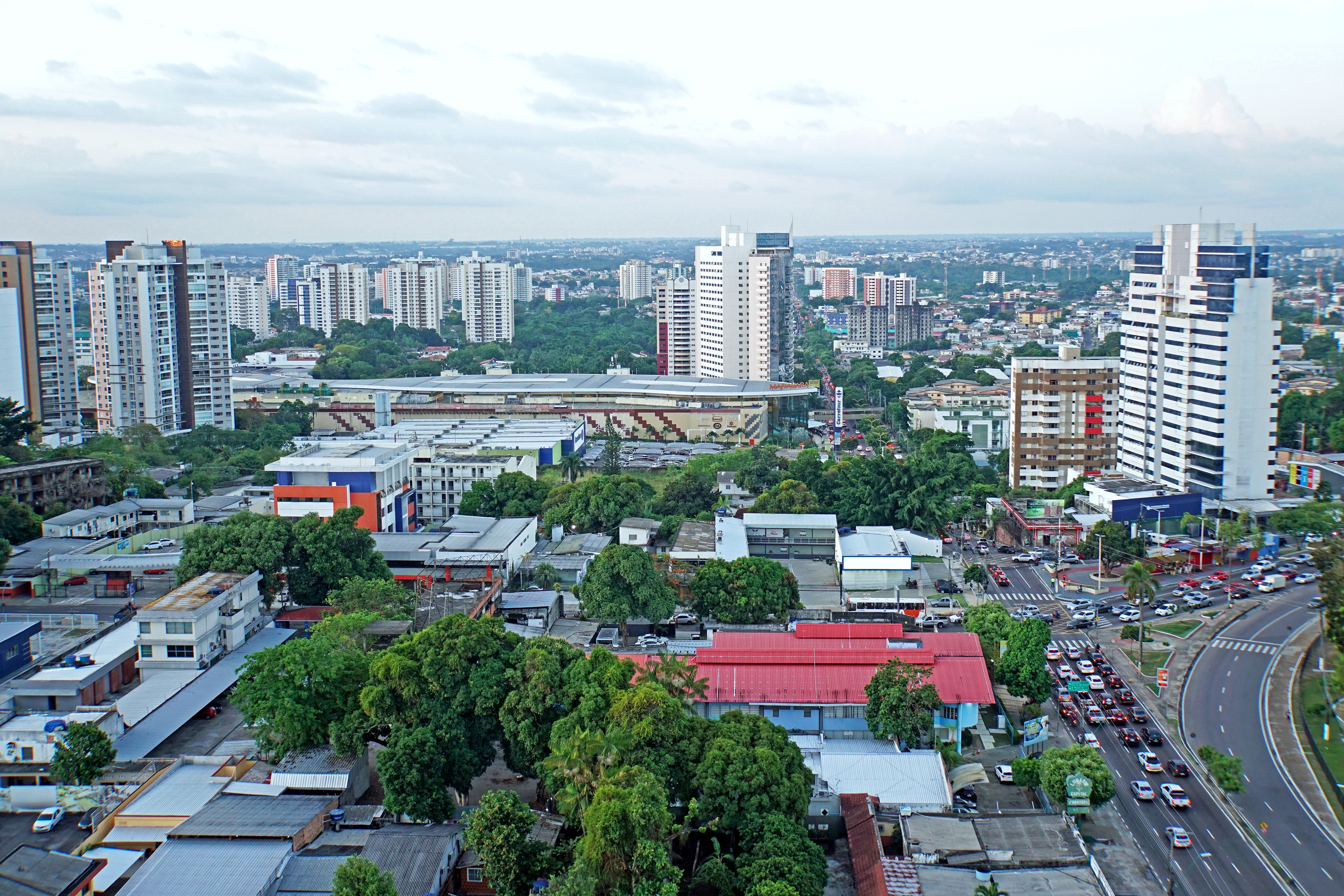 Avenida Umberto Calderaro, bairro Adrianópolis, Manaus, Amazonas, Brasil.